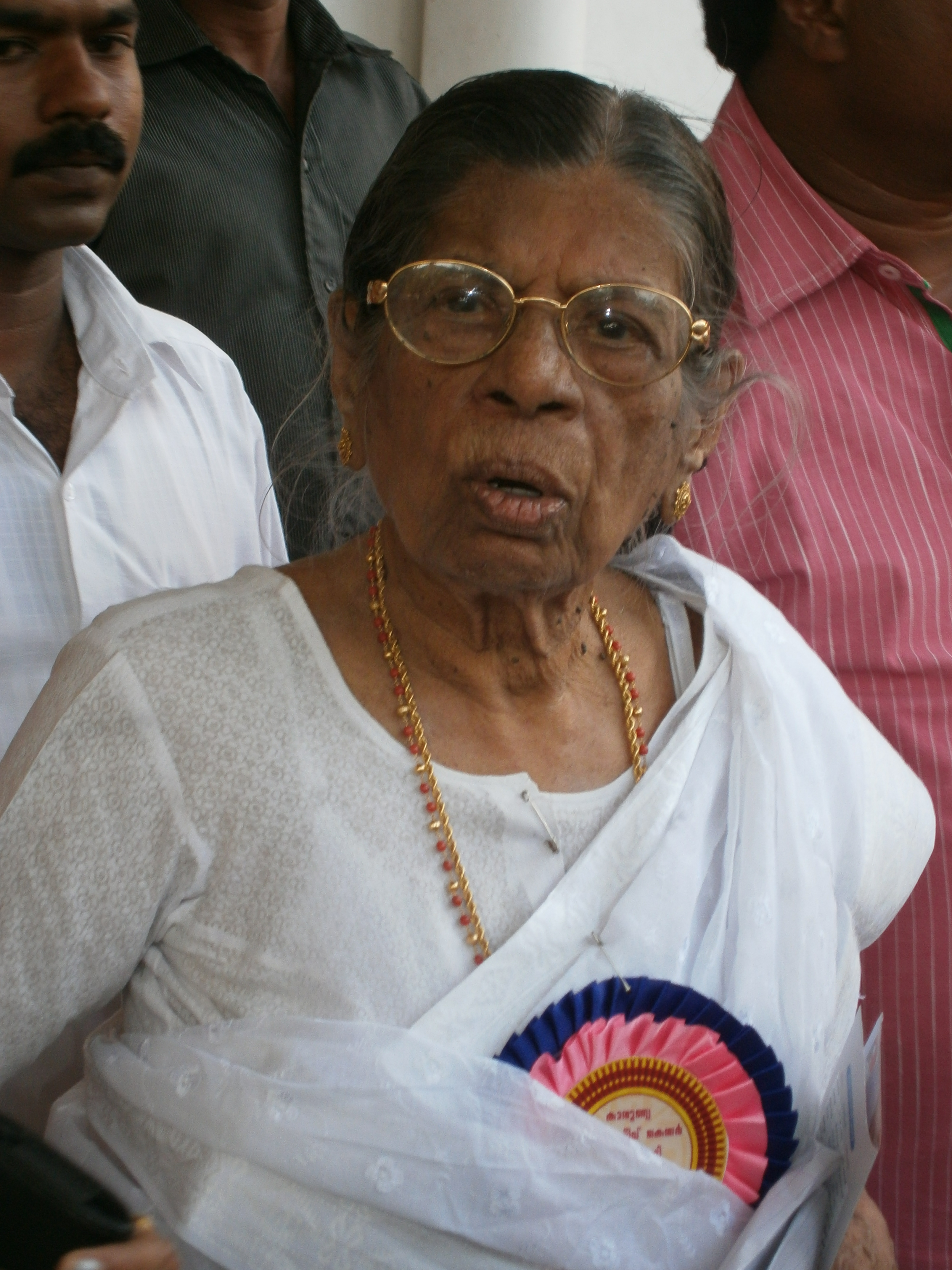 കെ.ആര്‍. ഗൌരിയമ്മ 2013 ല്‍